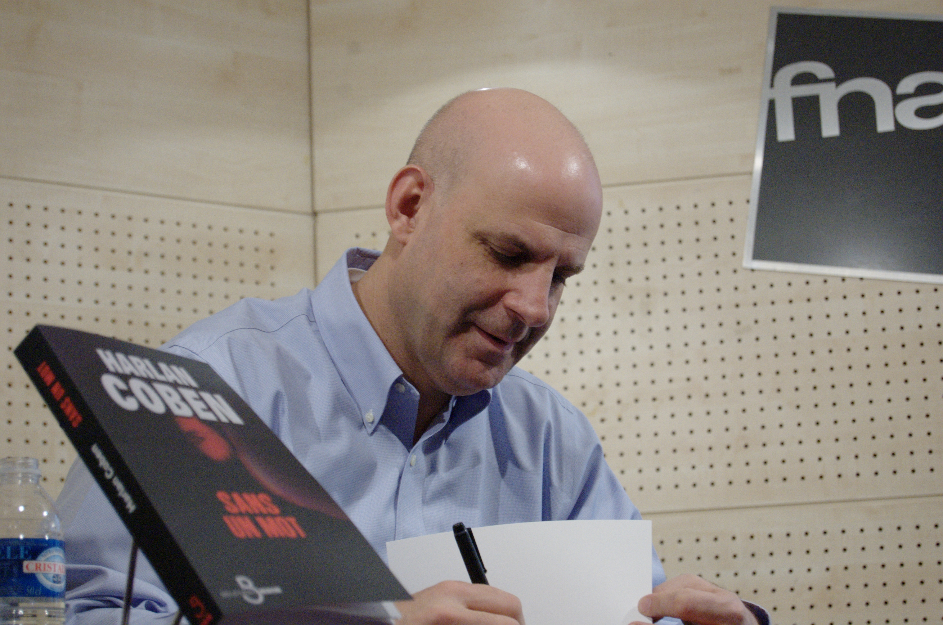 Harlan Coben lors d'une séance de dédicace à la Fnac St Lazare, Paris, France. 12 mars 2009.